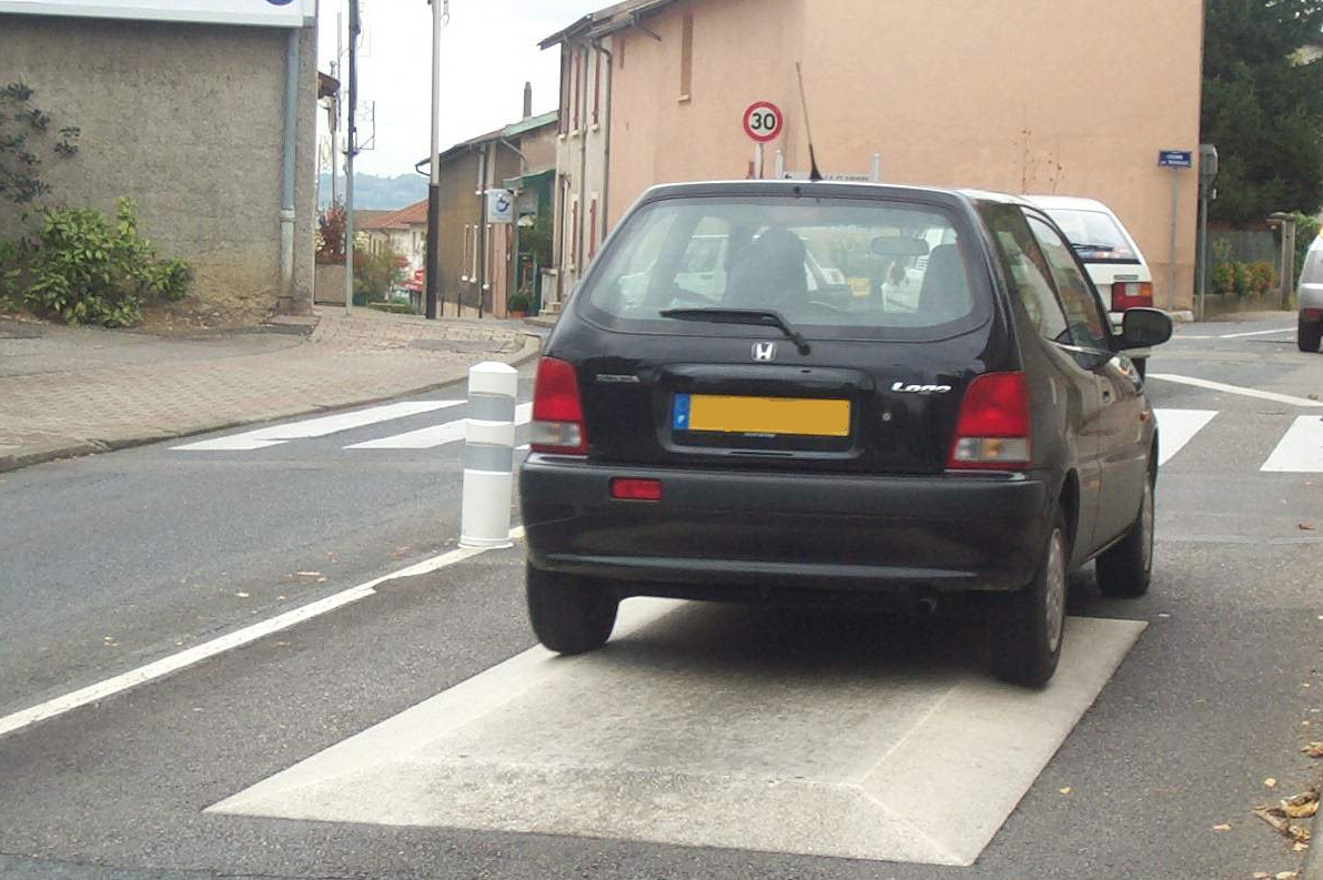 coussin berlinois en béton armé désactivé